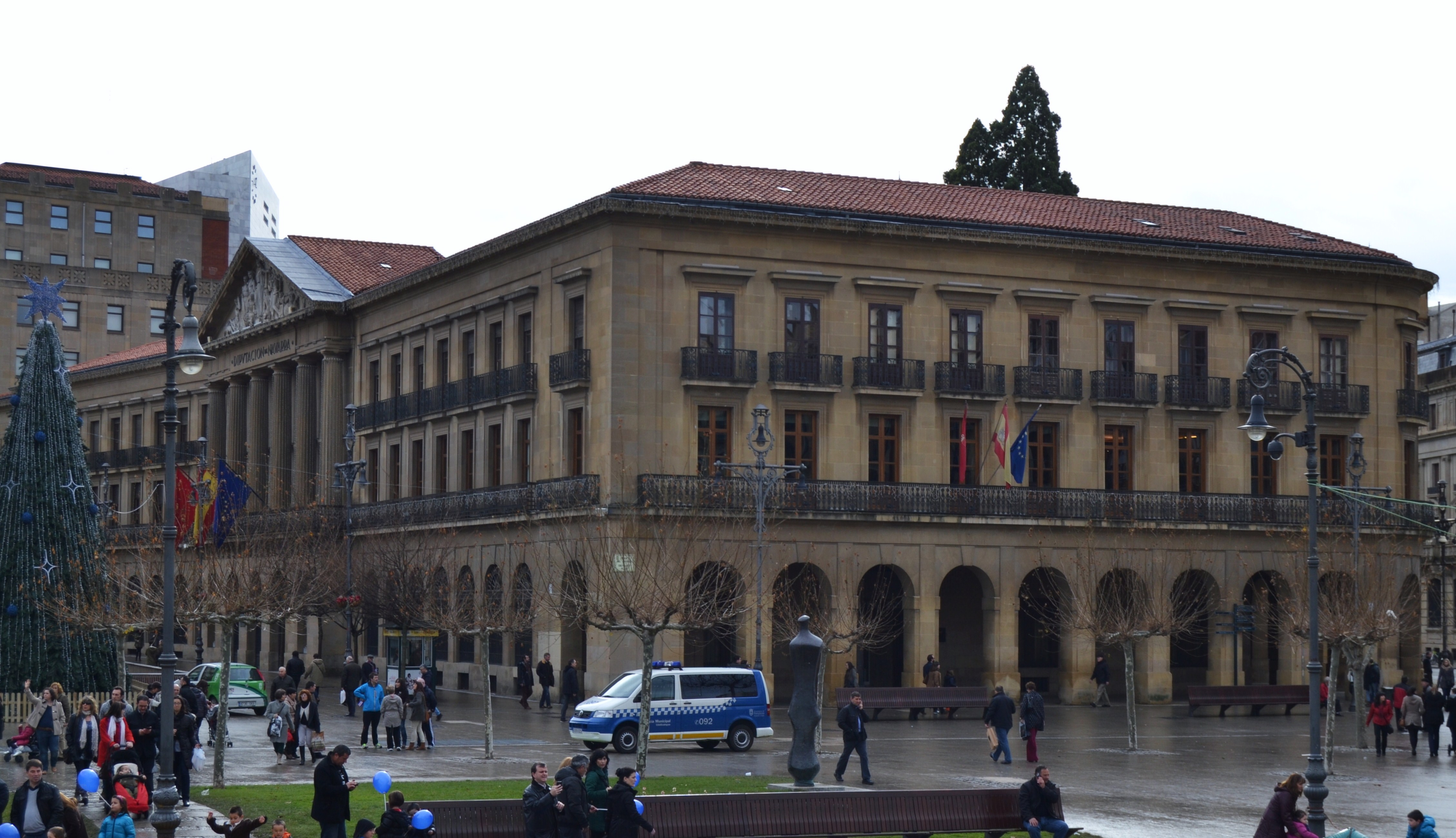 Palau de Navarra, Pamplona.